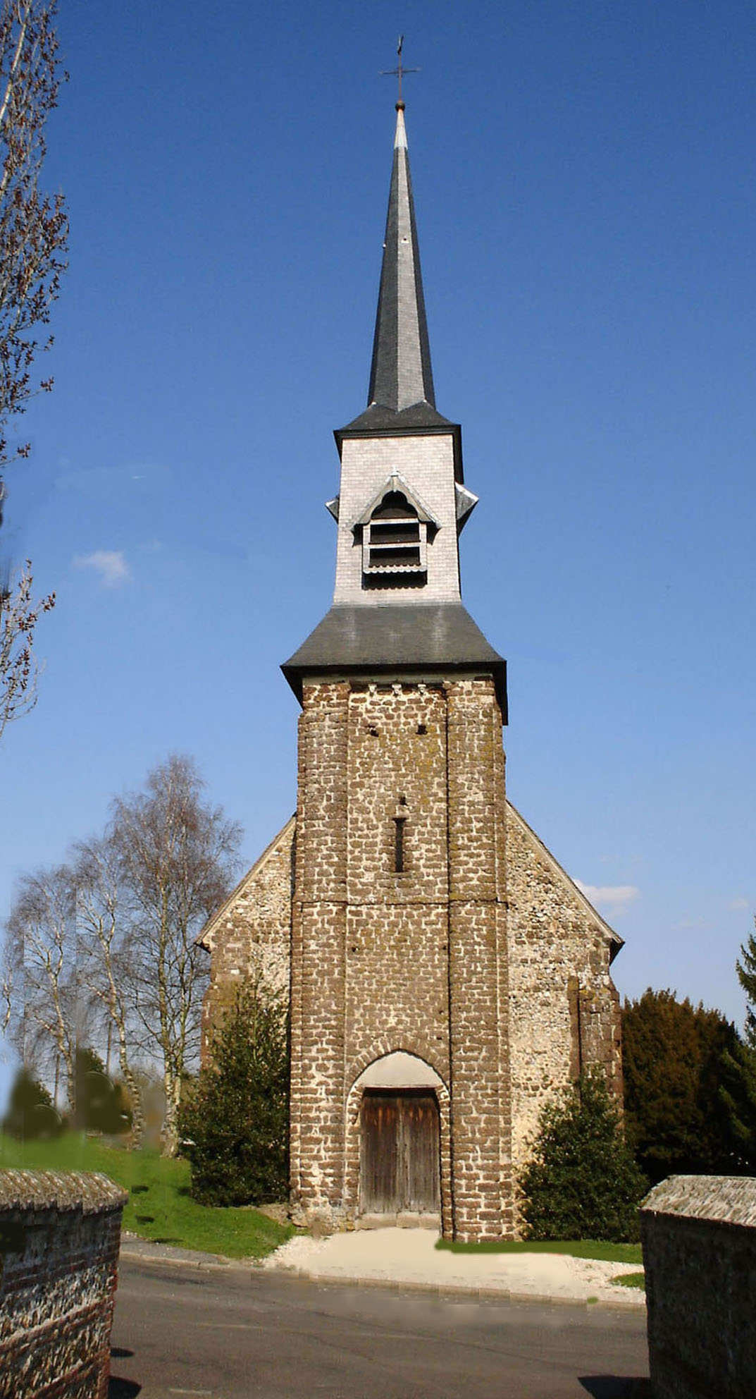 Vue du clocher et du porche de l'église Saint-Barthélemy de L'Aigle.